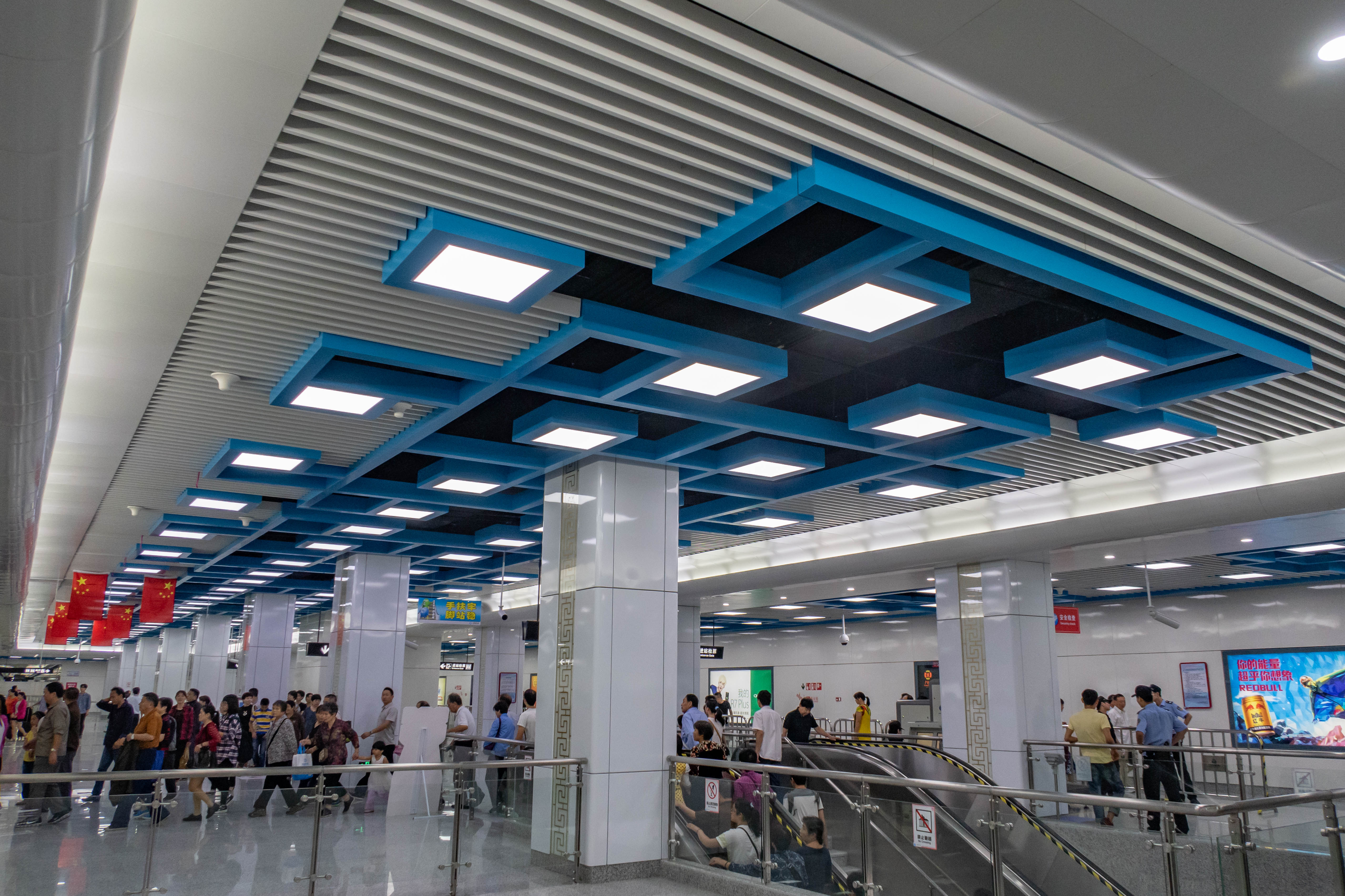 宁波轨道交通栎社国际机场站